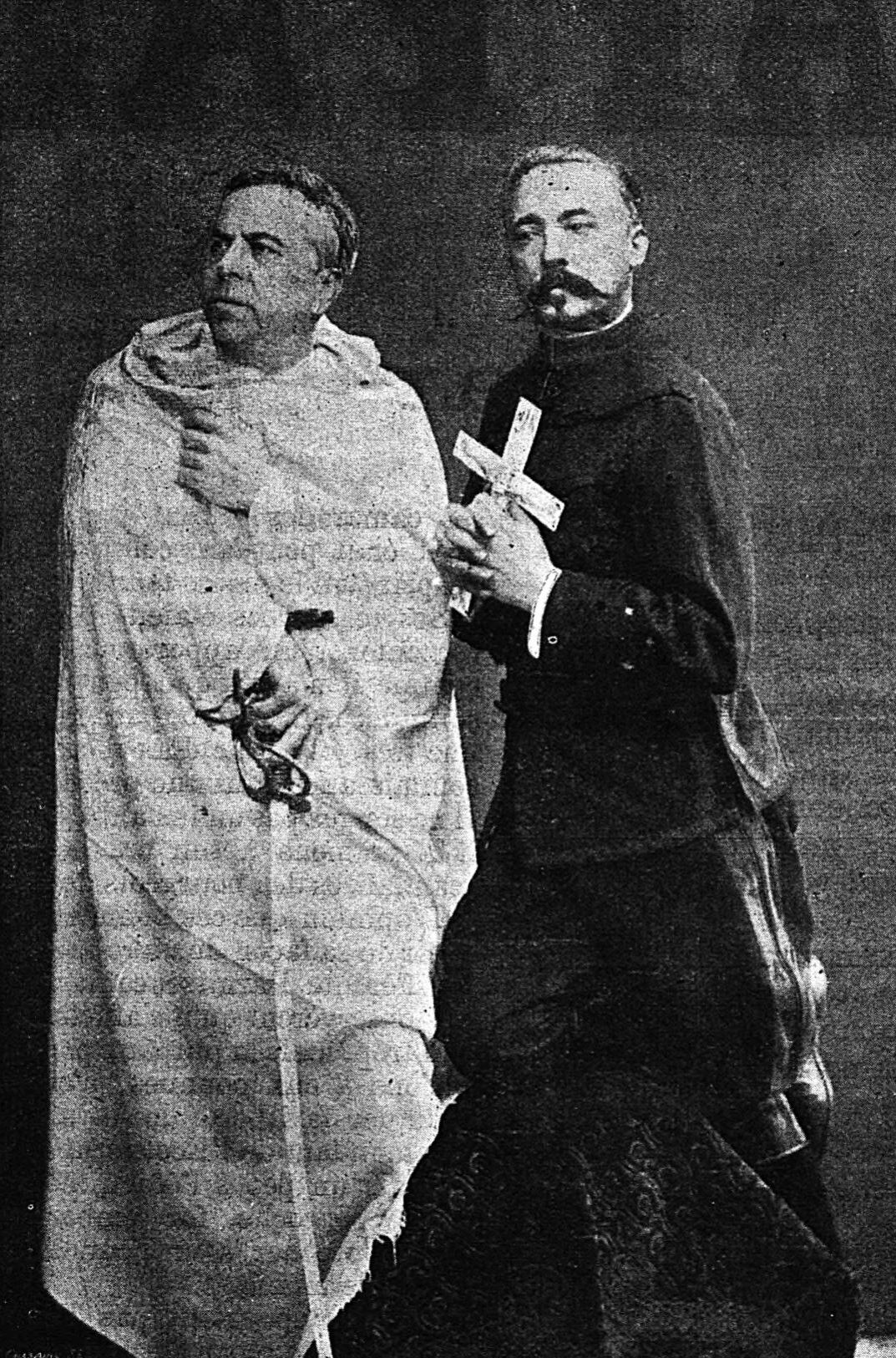 "Le R.P. Jamont et le général Didon". Photomontage humoristique et dreyfusard publié par Le Siècle.